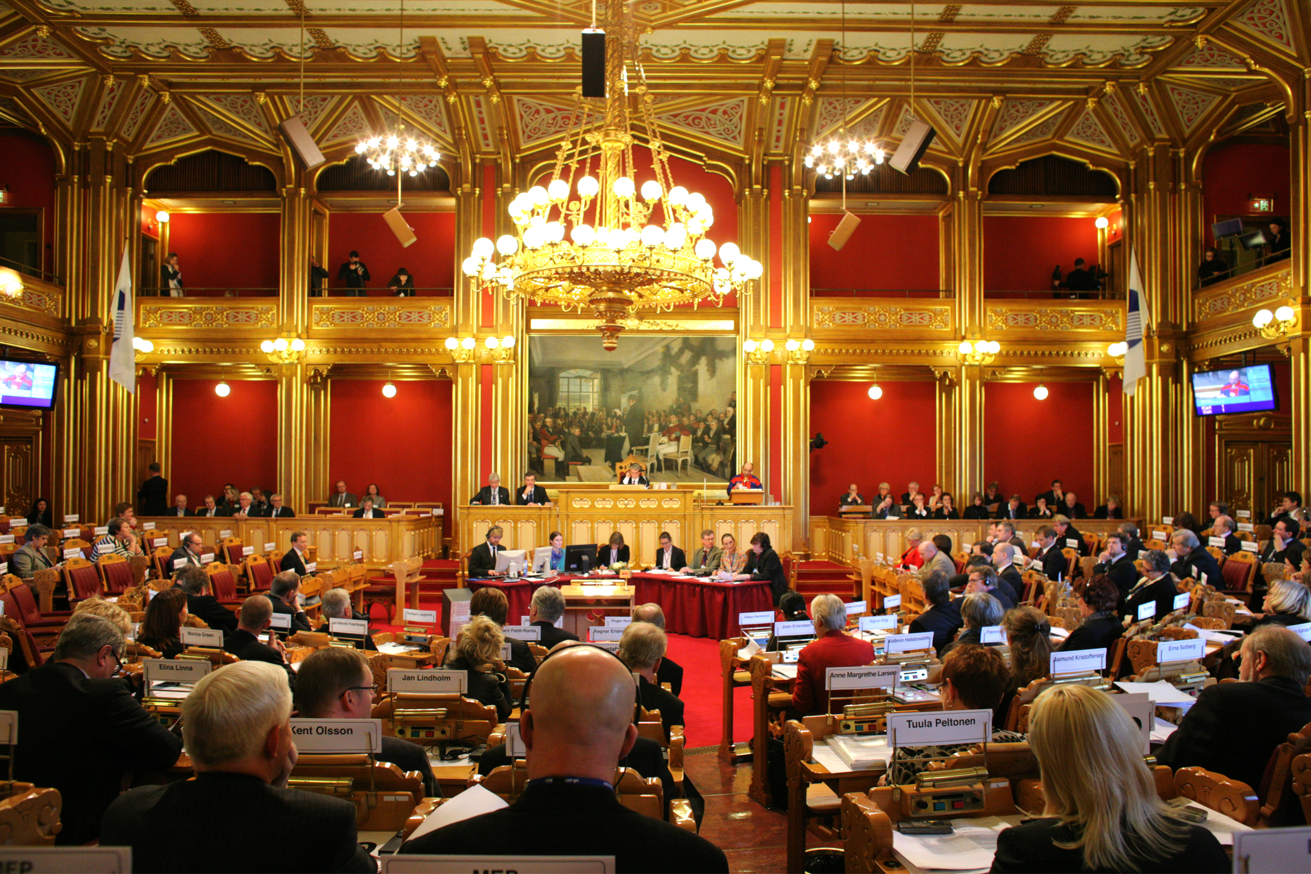 Nordiska Rådets session i Stortinget i Oslo.